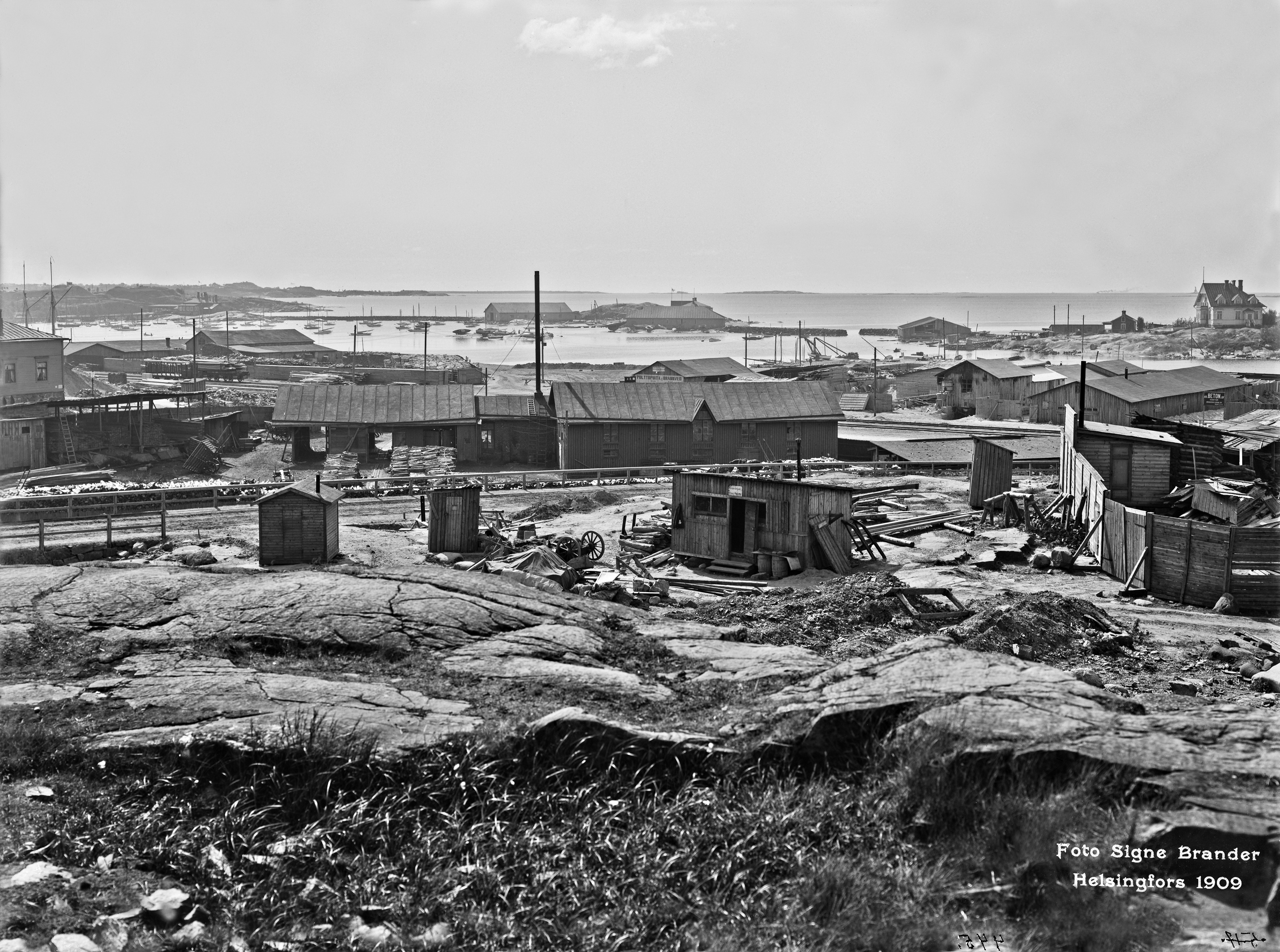 Eira, etualalla Wecksellintie; Eira, etualalla Wecksellintie. Taustalla vasemmalla Liuskasaari, oikealla Sirpalesaari. Kuvattu nykyisen Ehransvärdintie 9:n kohdalta kaakkoon. -- negatiivi ja vedos, lasi paperi pahvi, mv